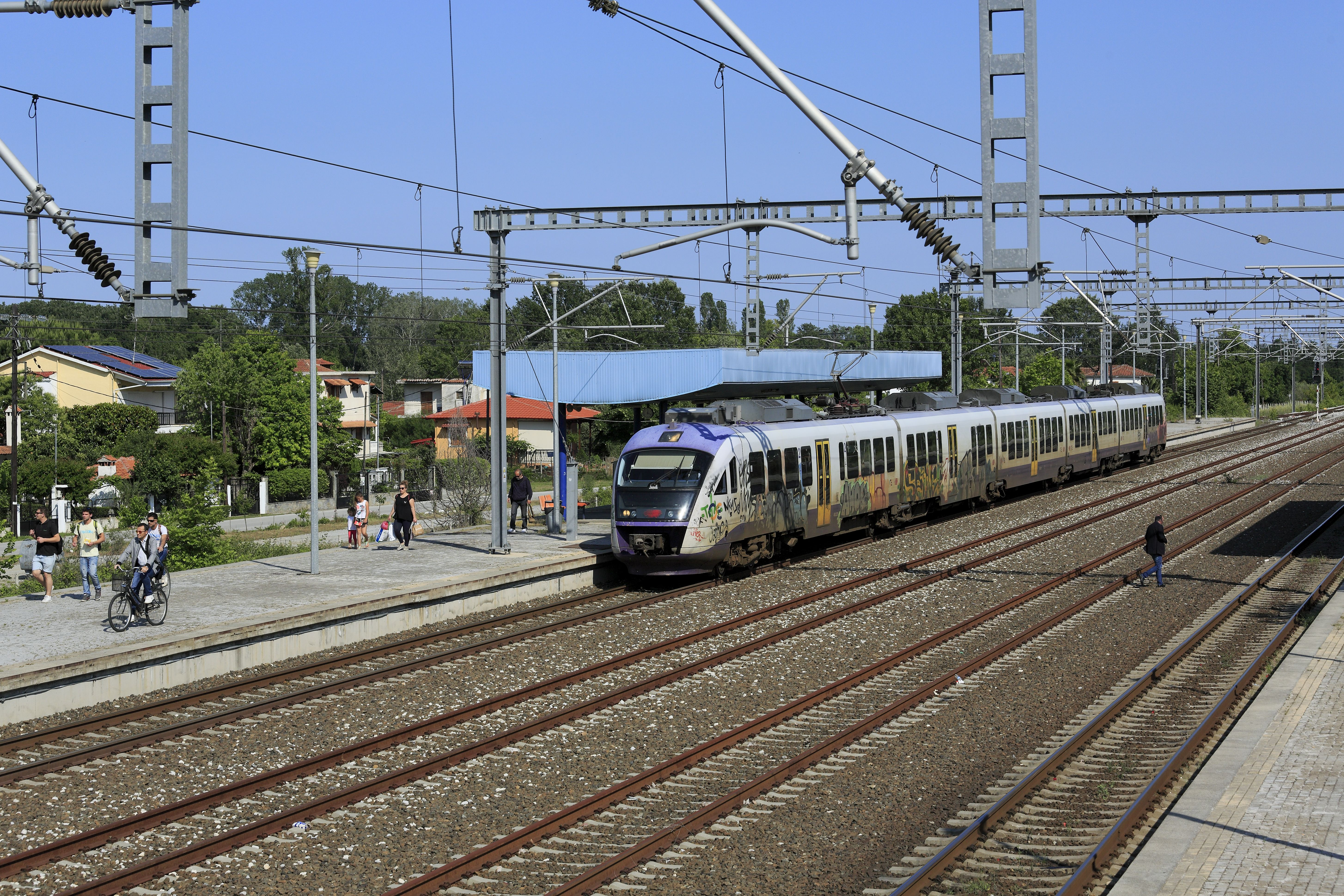 Proastiakos-Zug Lárisa–Thessaloníki am Bahnsteig von Néi Póri. Beide mittleren Stammgleise sind, an den rostigen Schienenköpfen erkennbar, ungenutzt. Bei einem angenäherten Zweistundentakt und reichlich Sicht in beiden Richtungen riskiert der Kollege rechts beim typisch griechischen Weg nach draußen nicht allzuviel.